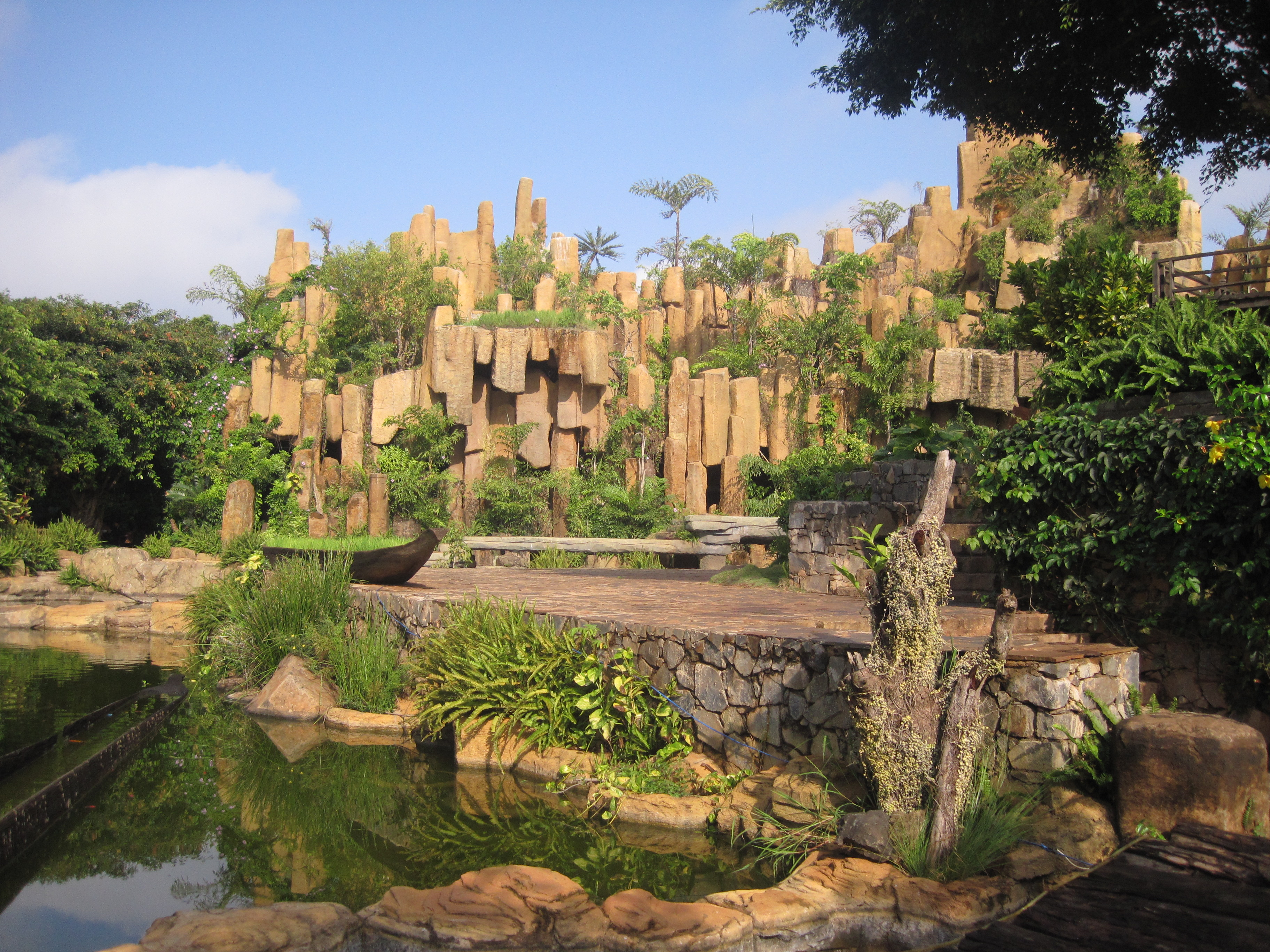 Khu thac nuoc